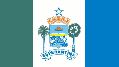 Bandeira do Município de Esperantina